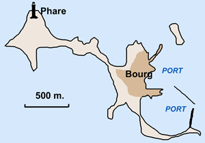 Description : Plan de l'ile de Sein Date : 2006 Lieu : Ile de Sein, Bretagne, France Author : Réalisation Pline